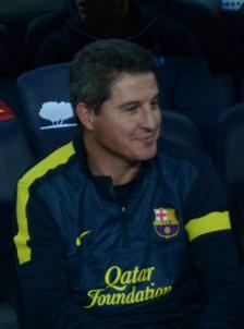 Aureli Altimira fisioterapeuta del FC Barcelona